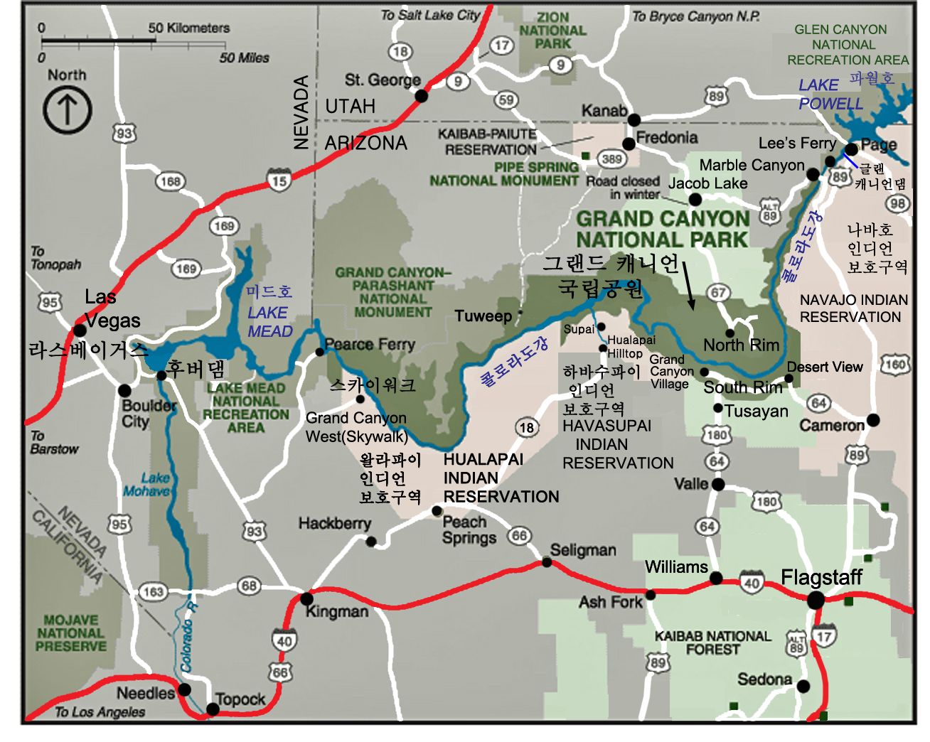 그랜드캐니언 인근지역 지도